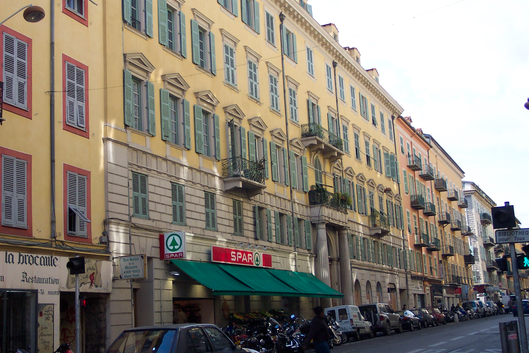 Nice-Rue Cassini Immeuble et sa porte monumentale